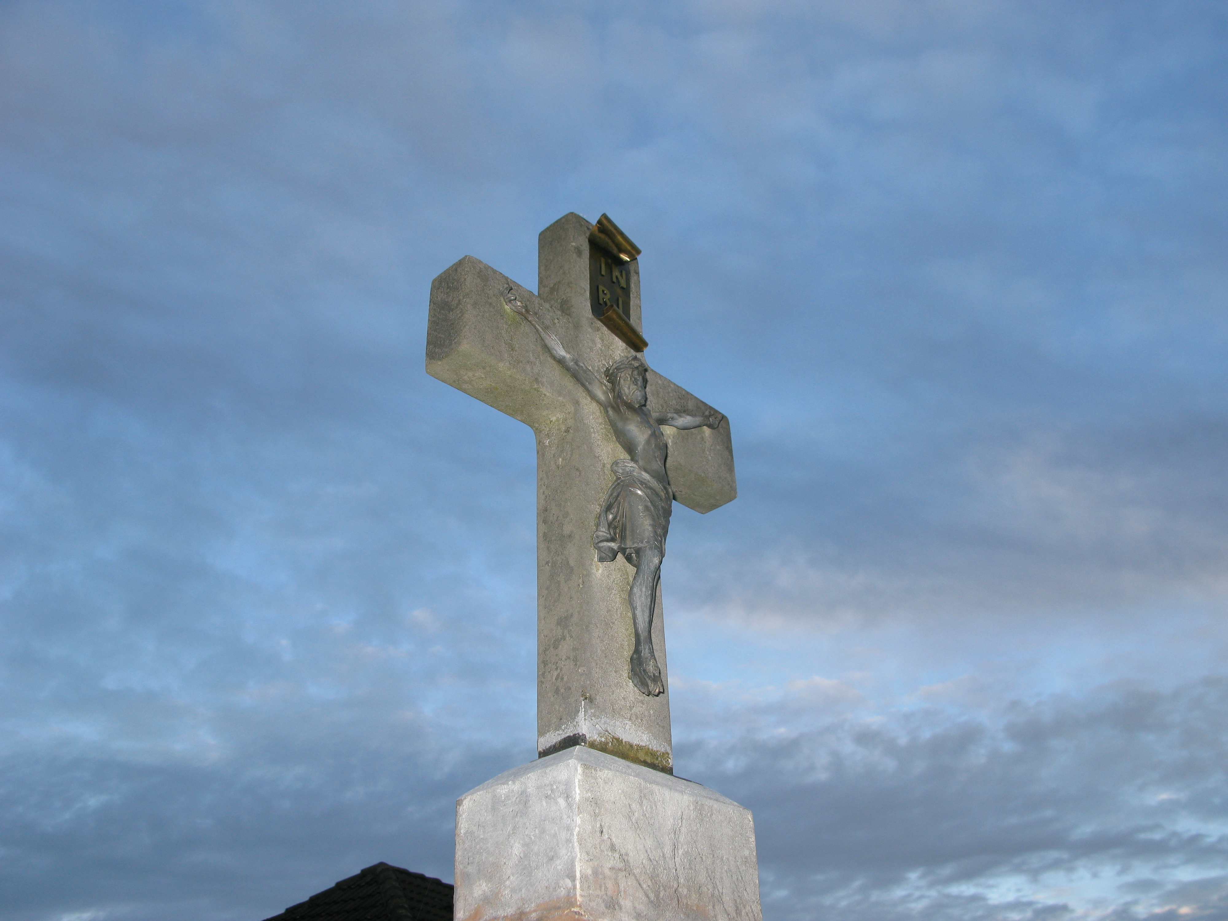 Kruzifix am Wegekreuz Holl (stadt Lohmar) am 4. November 2015.